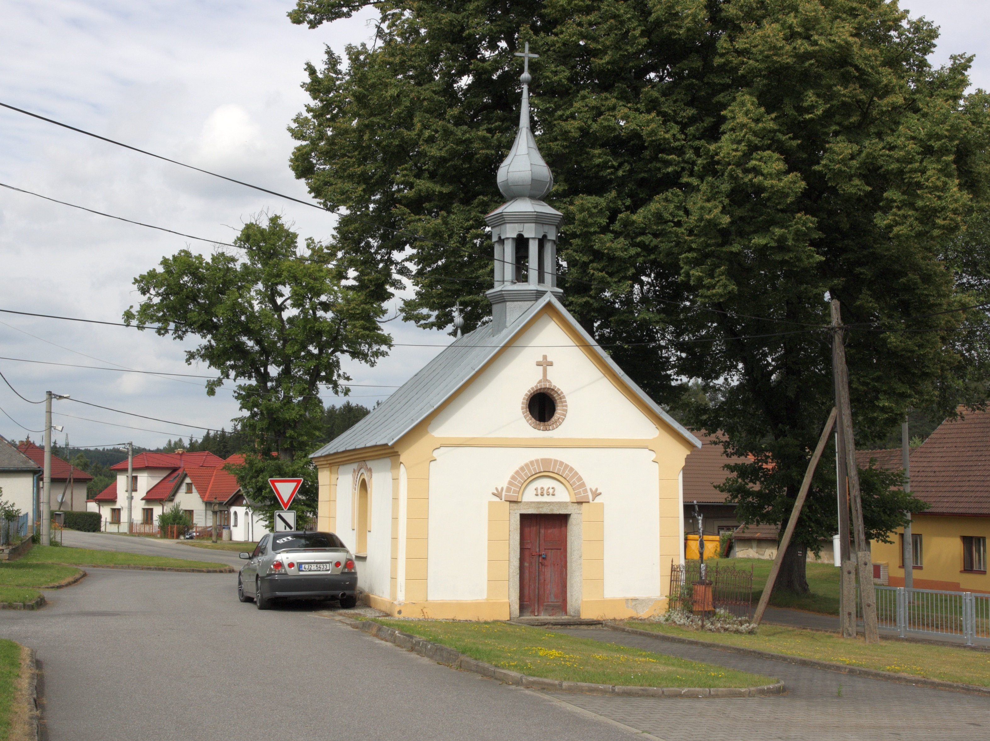 Dvorce (okres Jihlava) - kaple na návsi.